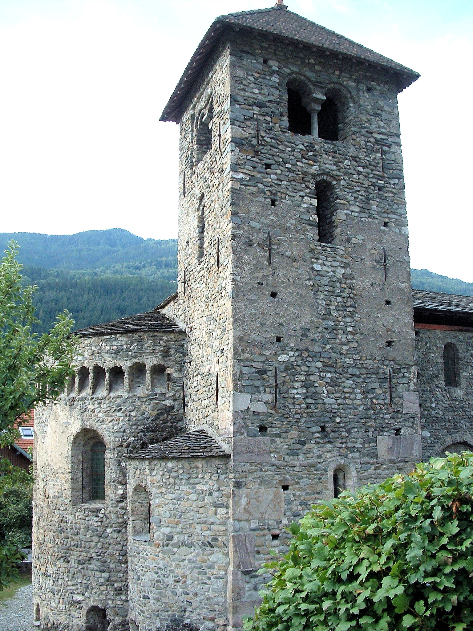 Aime - Eglise Saint-Martin - Clocher, abside et absiiole